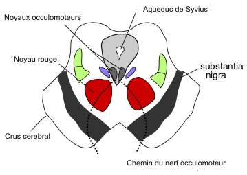 Il s'agit d'une section transversale du mésencéphale au niveau du colliculus supérieur. Il montre la trajectoire approximative de chaque nerf oculomoteur